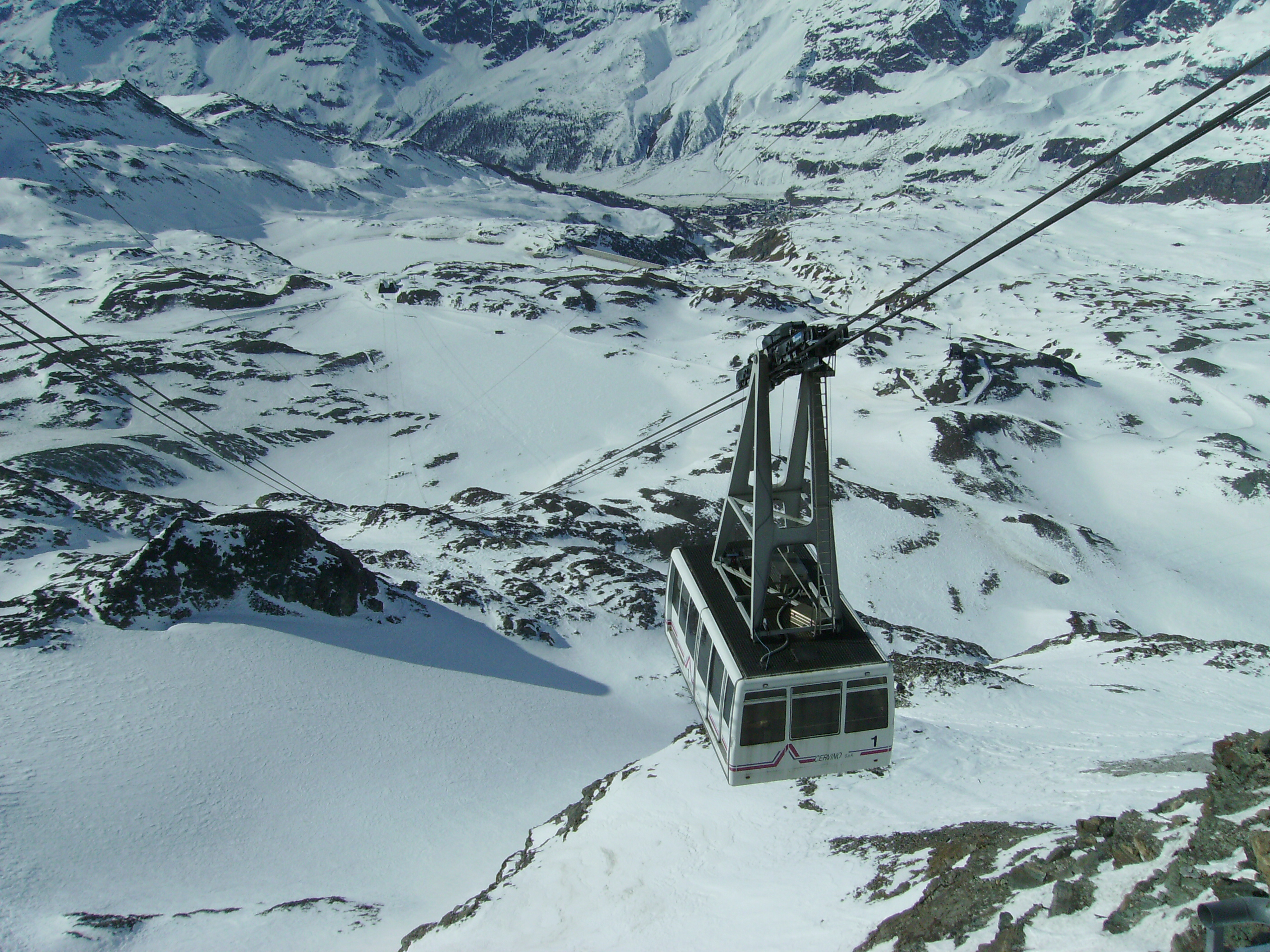 Funivia Plateau Rosa, Breuil-Cervinia (Valle d'Aosta)